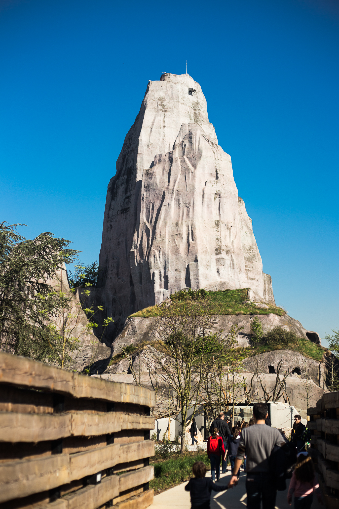 Parc Zoologique de Paris, France.